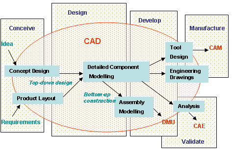 컴퓨터 도움 설계 (캐드)의 절차